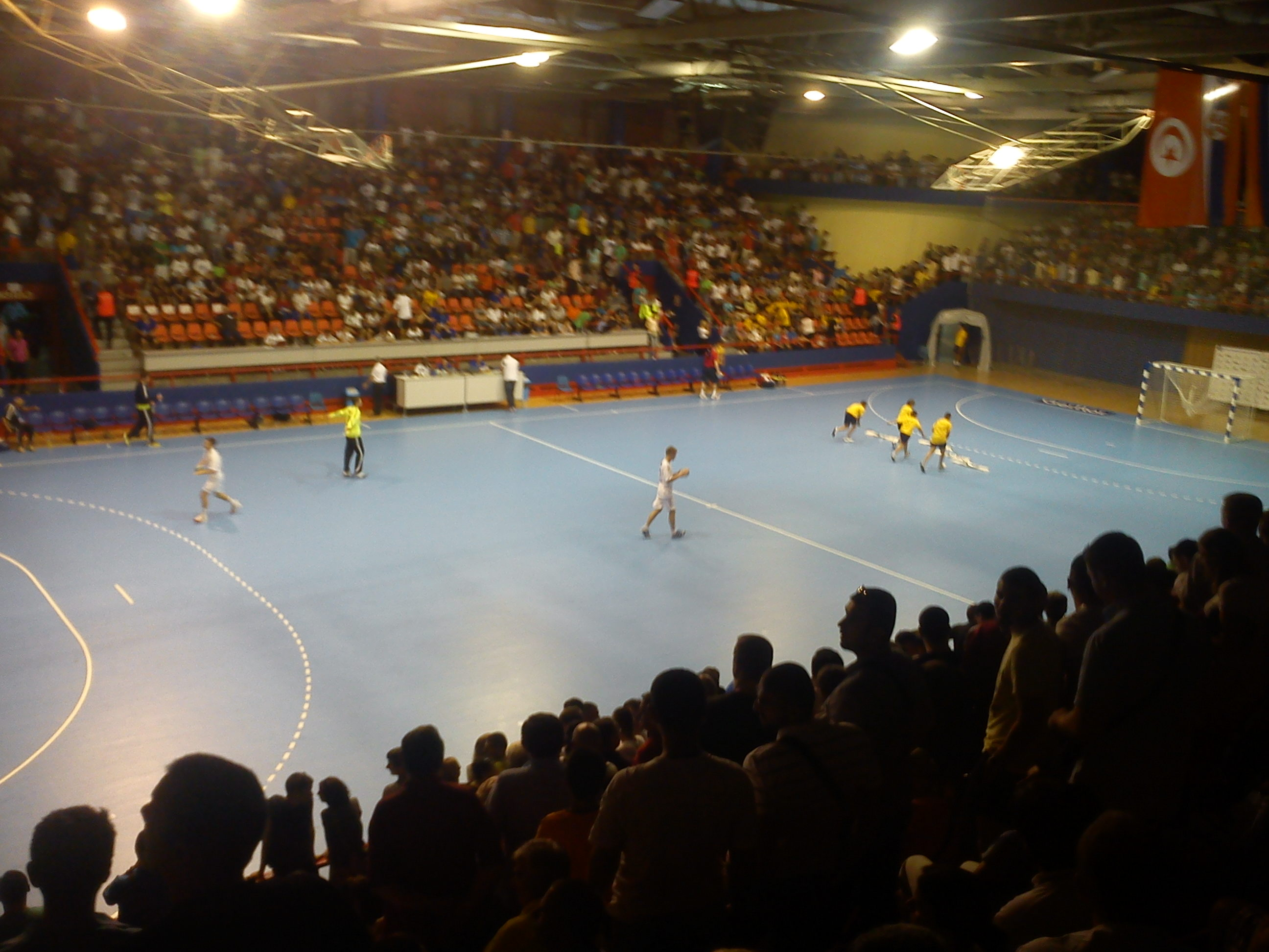 SD "Borik" Banja Luka (2013. god.)